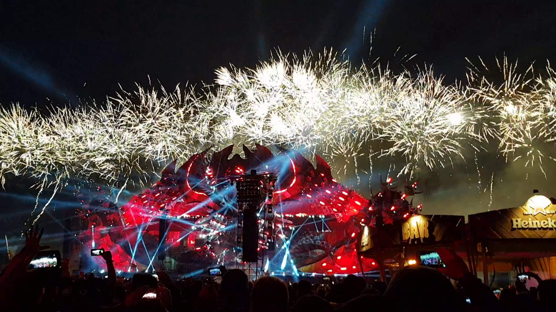 Defqon Sunday Endshow